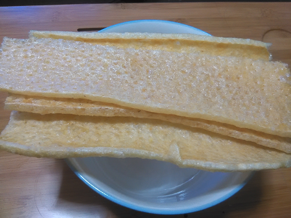 中文（中国大陆）: 未经泡发的皮肚